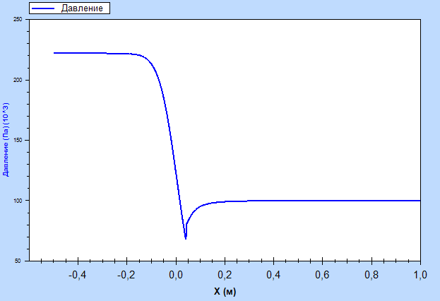 Результат тестовых расчетов по определению влияния степени нерасчетности на параметры течения в радиусо-коническом сопле со степенью расширения равной 8. Все расчеты проводились в безразмерном виде. Показатель адиабаты принимался равным 1.25. Степень нерасчетности - 0.45. Расчет проводился по методике Кудрявцева.